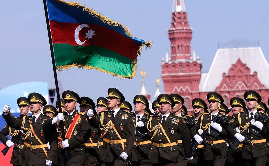 Военный парад, посвящённый 65-летию Победы в Великой Отечественной войне.